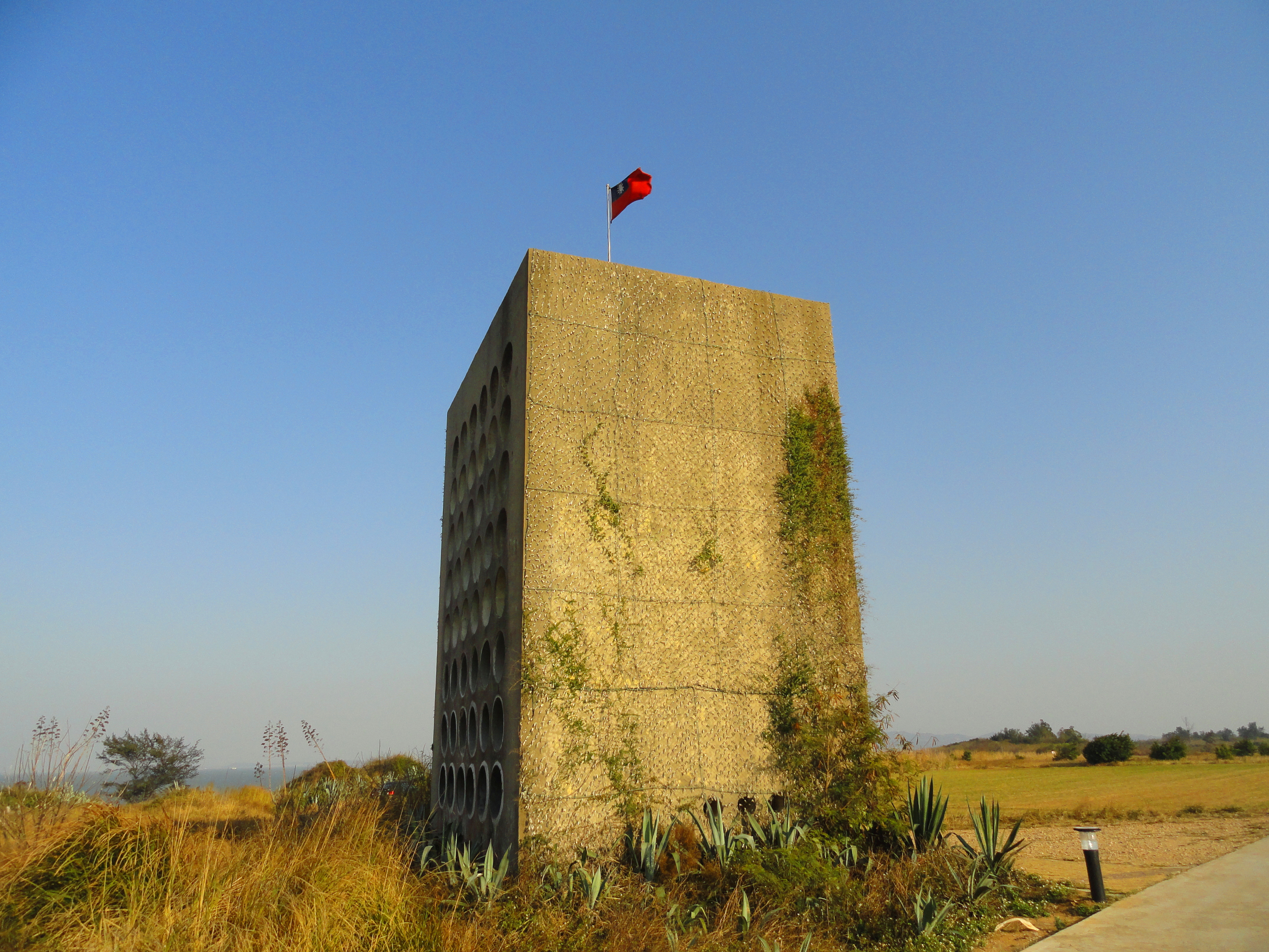 中文（中国大陆）: 位于金门的古宁头播音墙